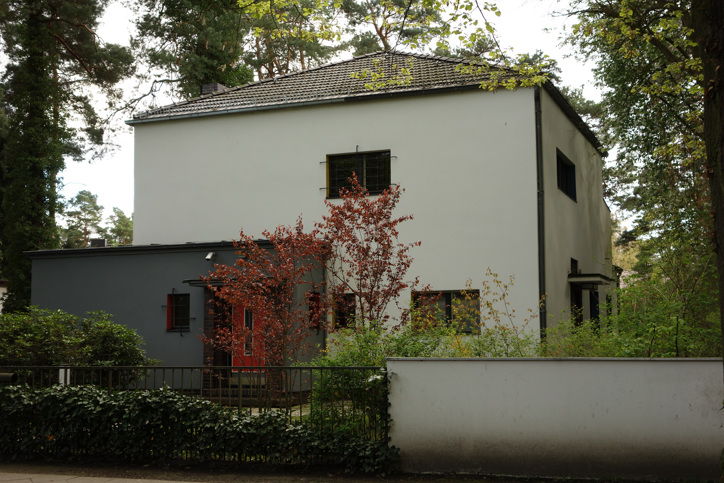 Kulturdenkmal Berlin Frohnau Ludolfingerweg 17